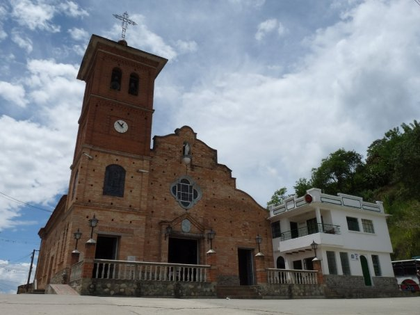 Foto del la Parroquia de San Antonio de Arma, Caldas, tomada luego de un viaje a las fiestas del pasillo en Aguadas